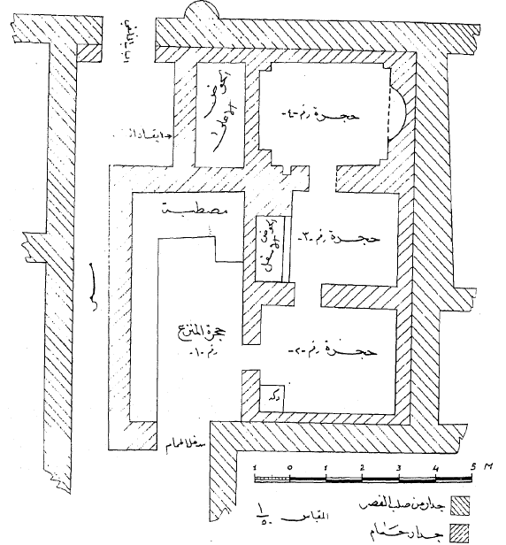 مخطط أرضي للحمام في قصر الأخيضر